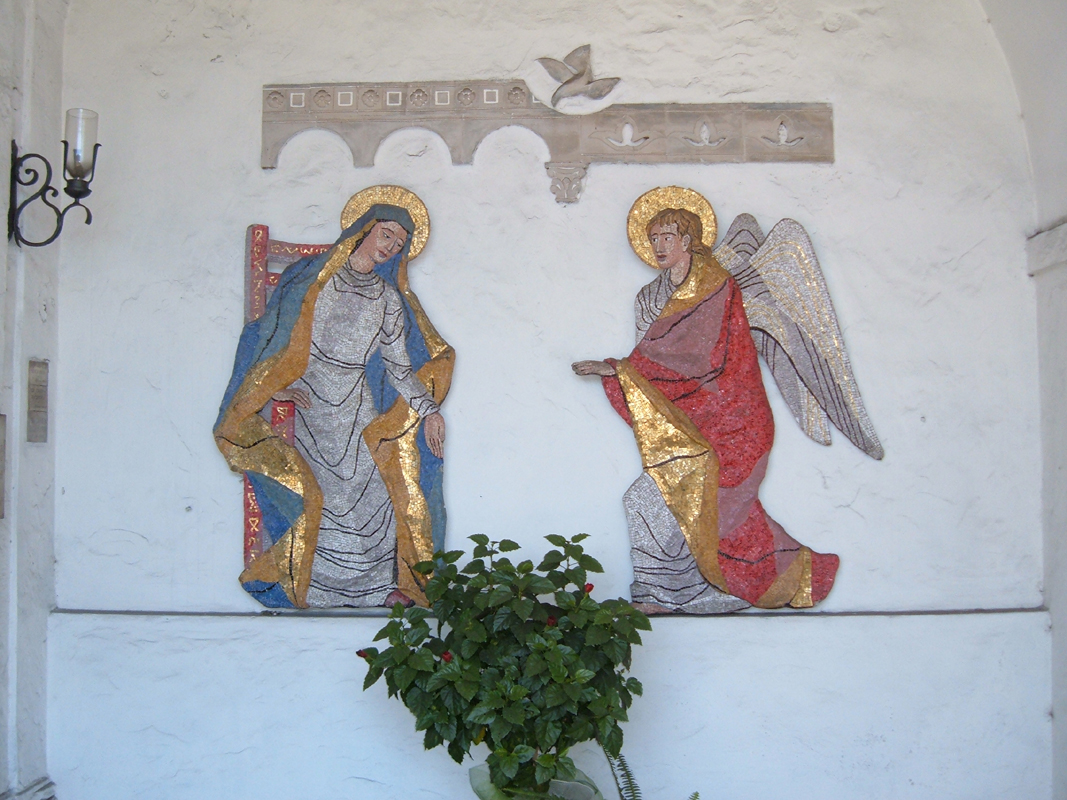 Cappella della Madonna dell'Arco Oscuro, a Roma, nel quartiere Pinciano. Annunciazione.